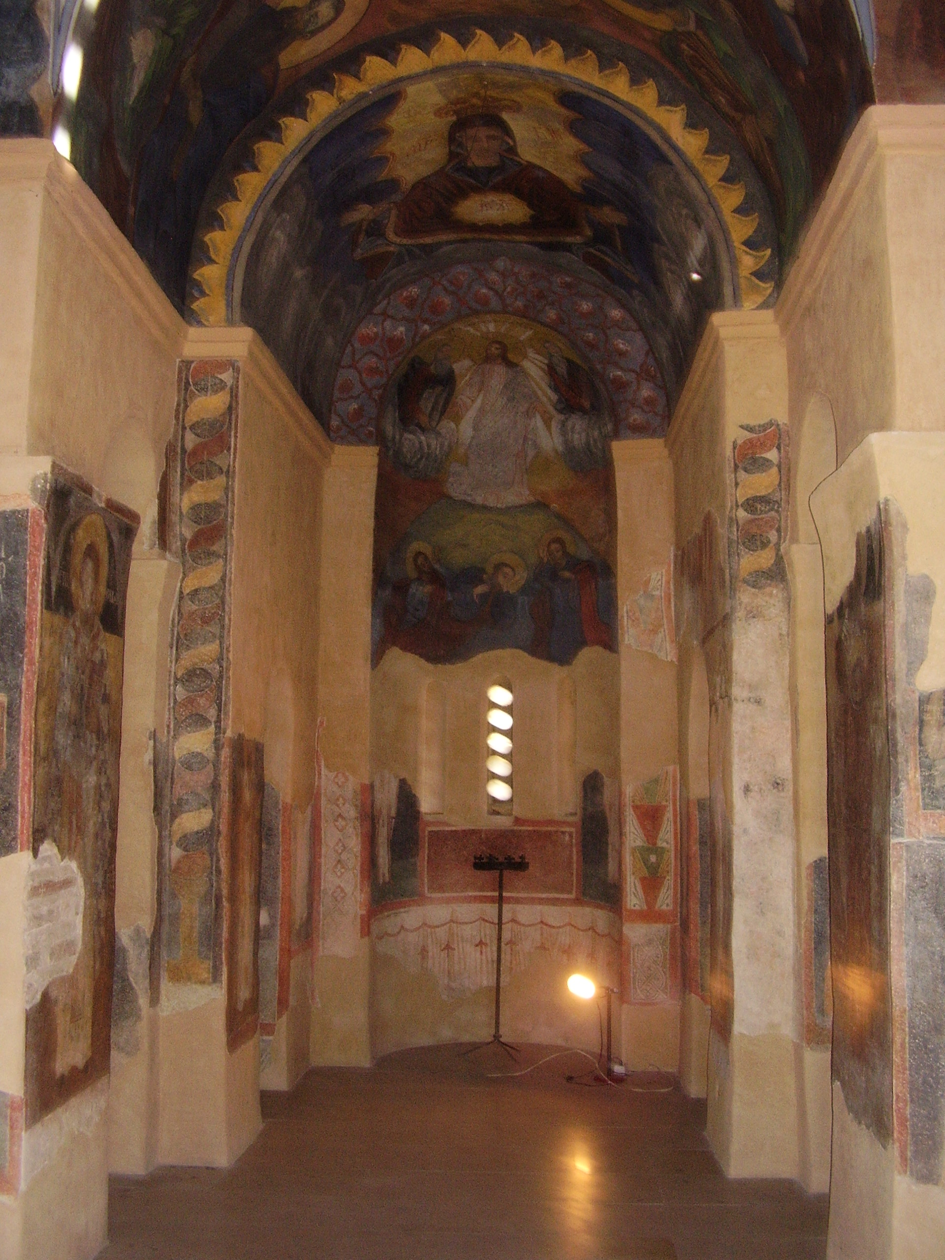 Църквата "Свети Георги" - общ изглед от вътре